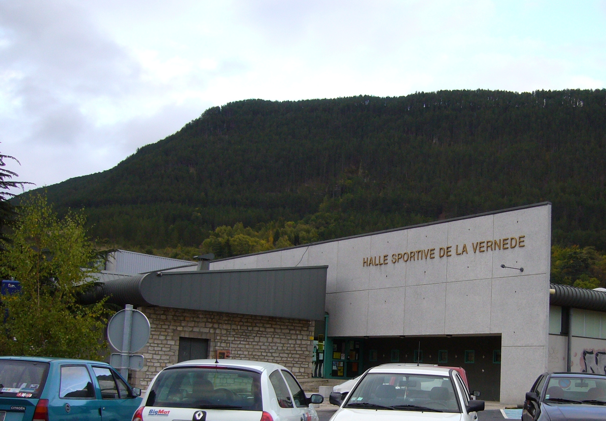 Halle Sportive de a Vernède, Mende, Lozère (France)